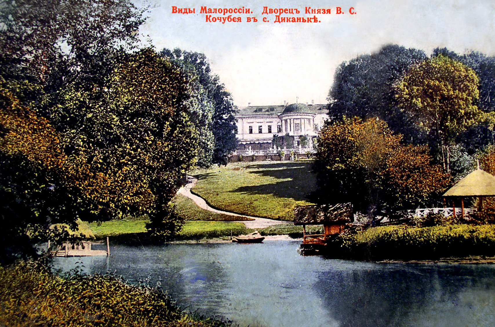 Kochubey Palace in Dikanka